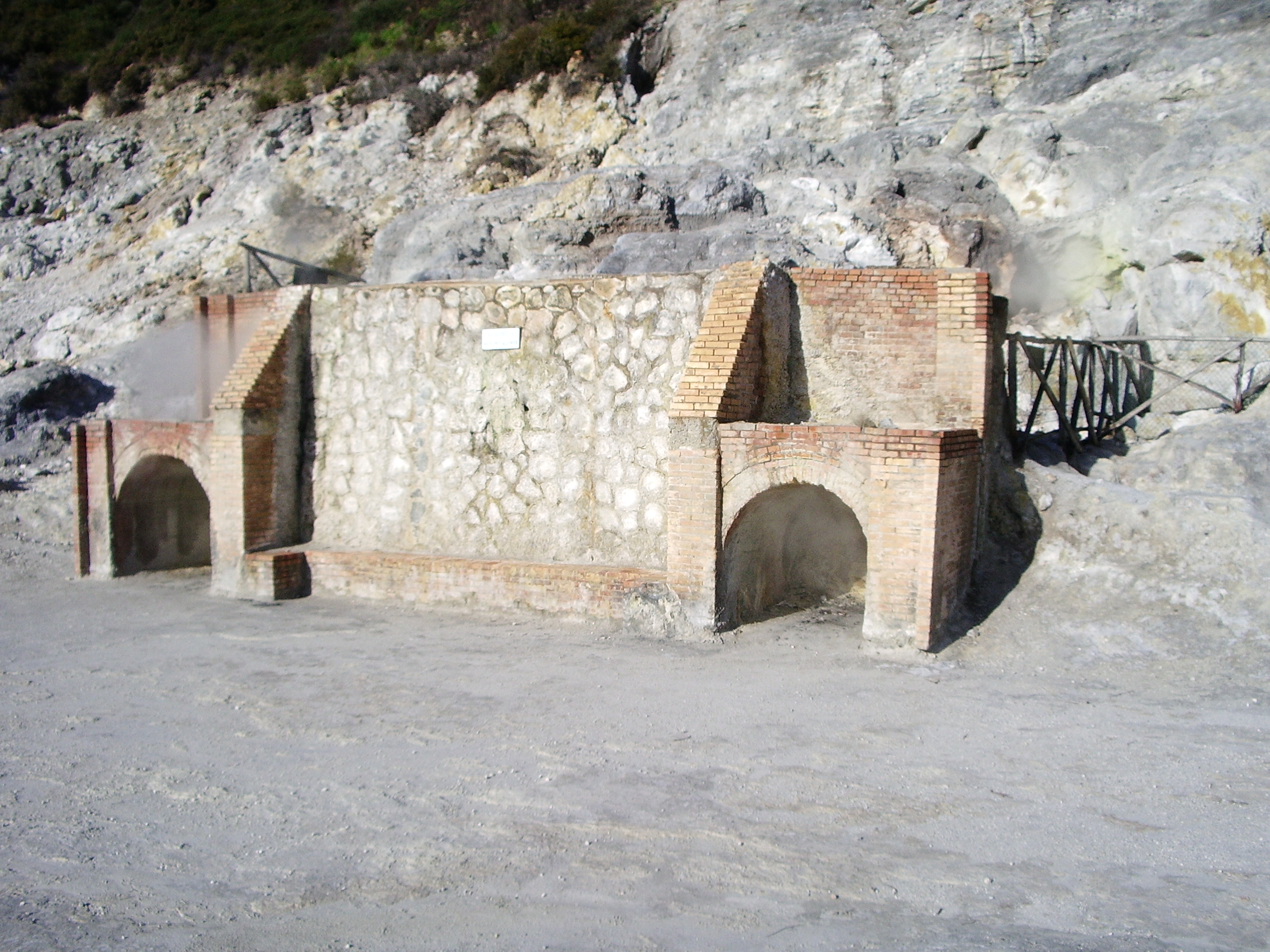 Grottes aménagées pour prendre des bains vaporeux d'anhydride sulfurique. Copyleft Je suis l'auteur de cette photographie